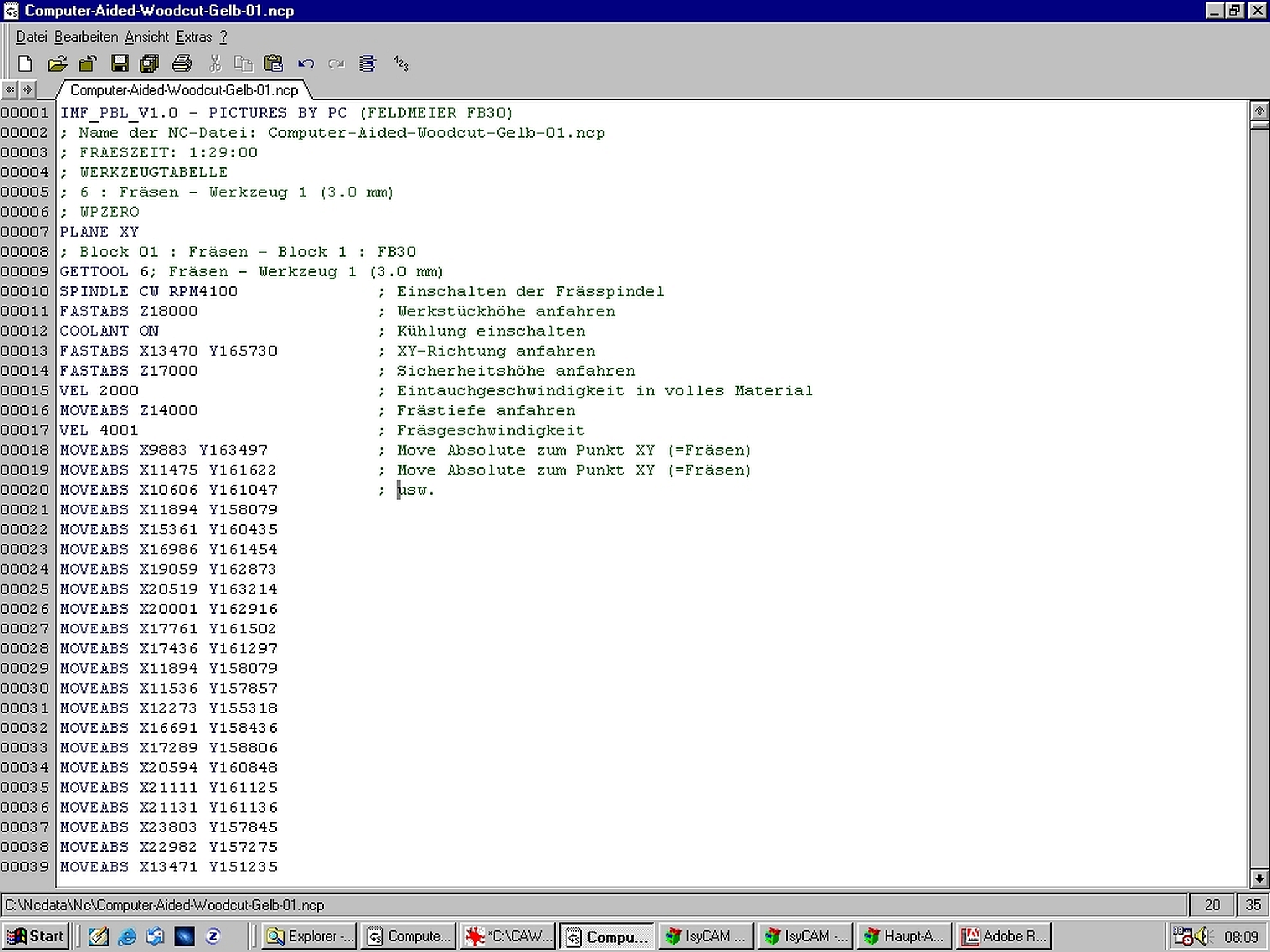 Dieses Bild zeigt einen Screenshot von NCP-Daten für einen computerunterstützten Holzschnitt. Die NCP-Datei wird von einem sogenannten Postprozessor des CAD-Programms erzeugt.